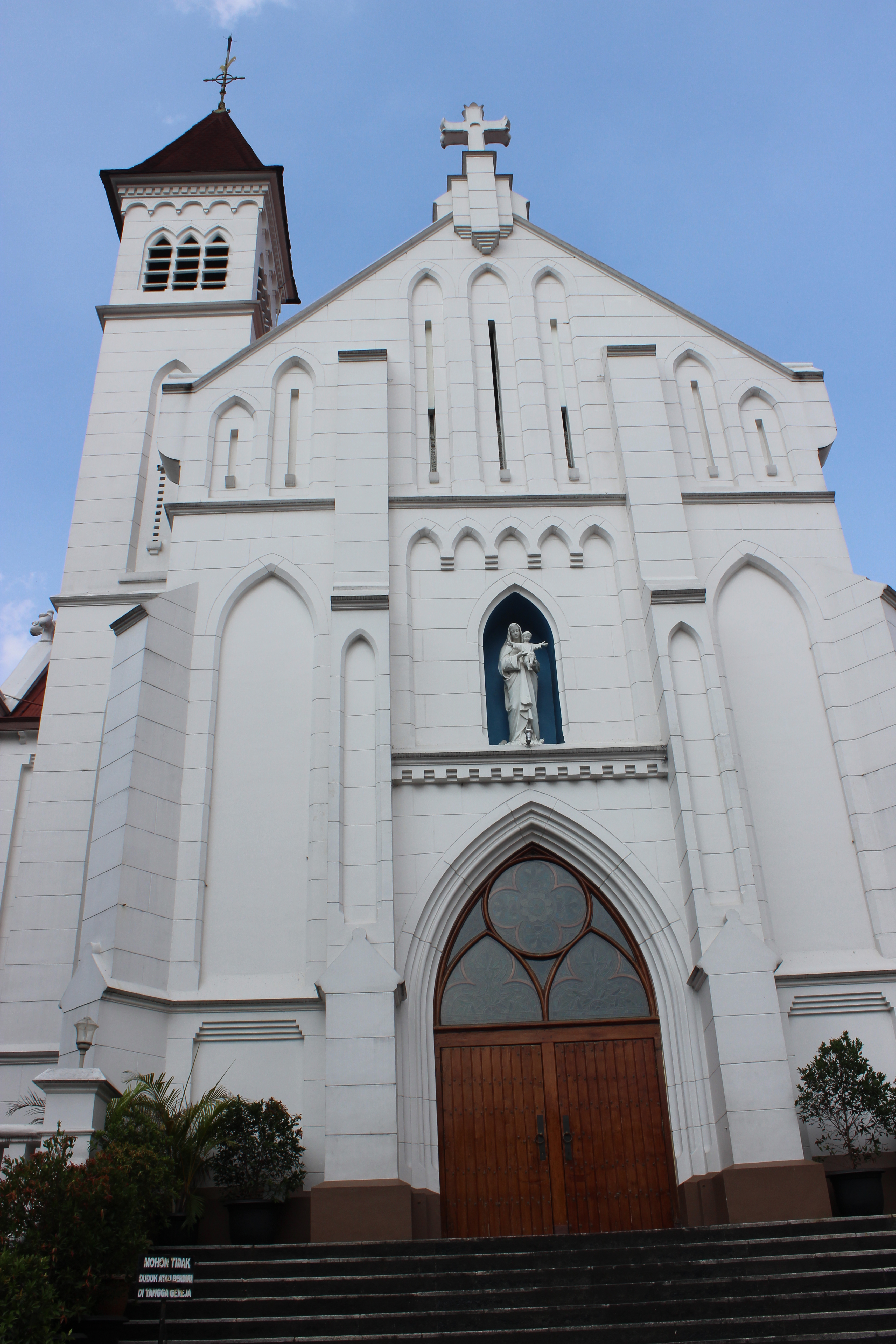 Tampak luar Gereja Katedral Santa Perawan Maria Bogor